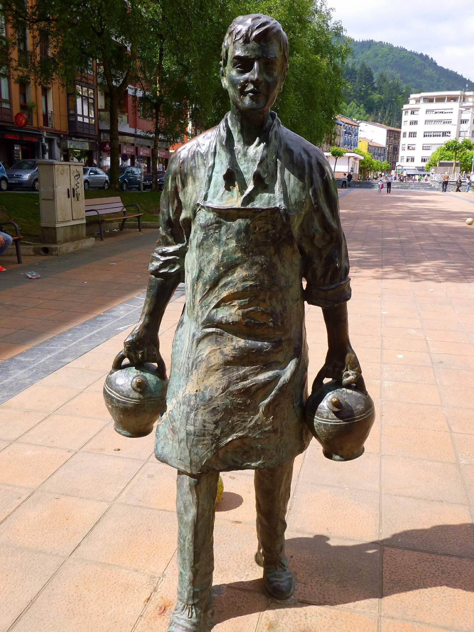 Eibar (Guipúzcoa)